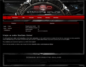 Úvodní stránka oficiální stránky hry Stargate Online